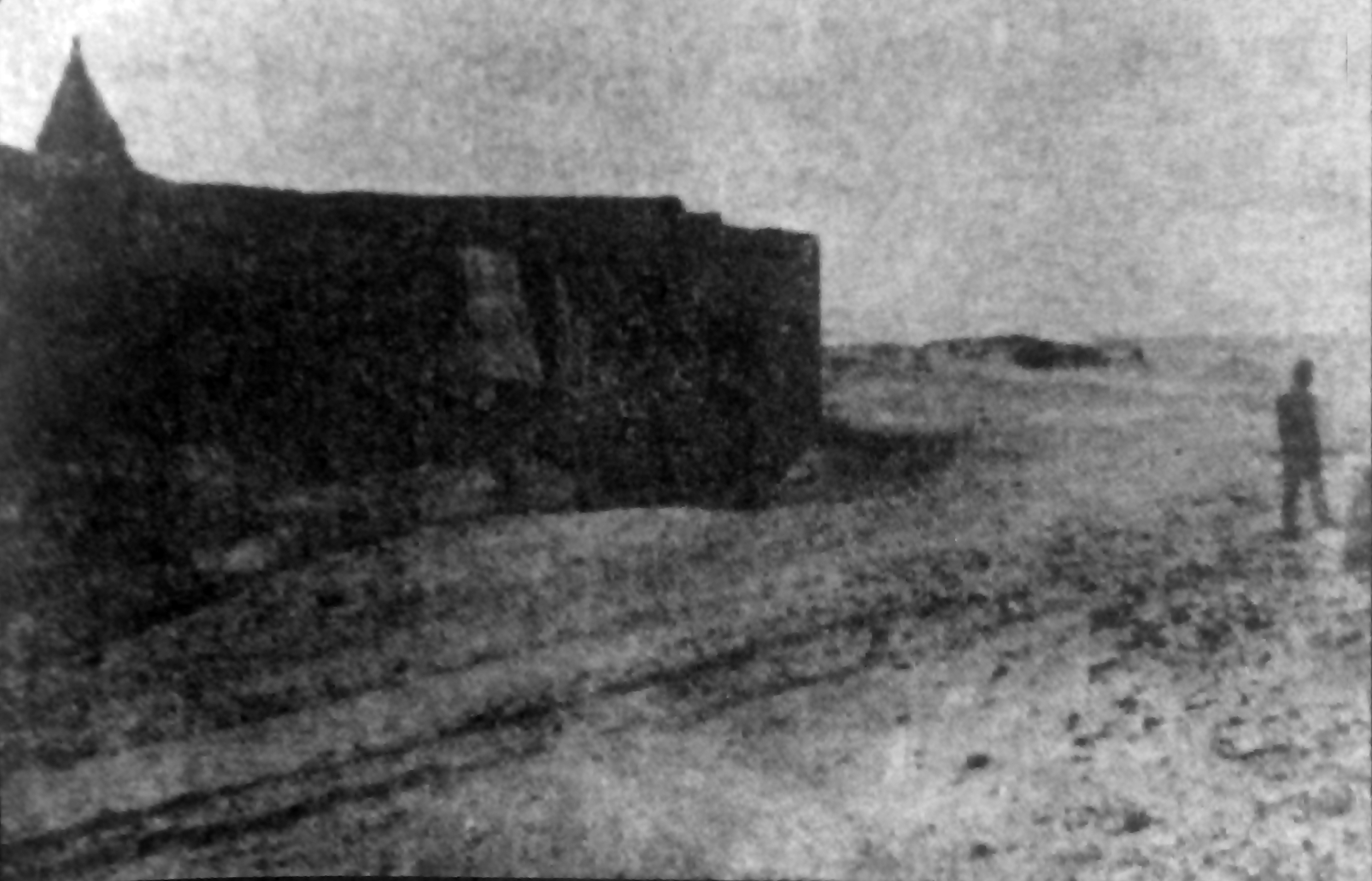 دير القديس أنبا مقار من الخارج عام 1935